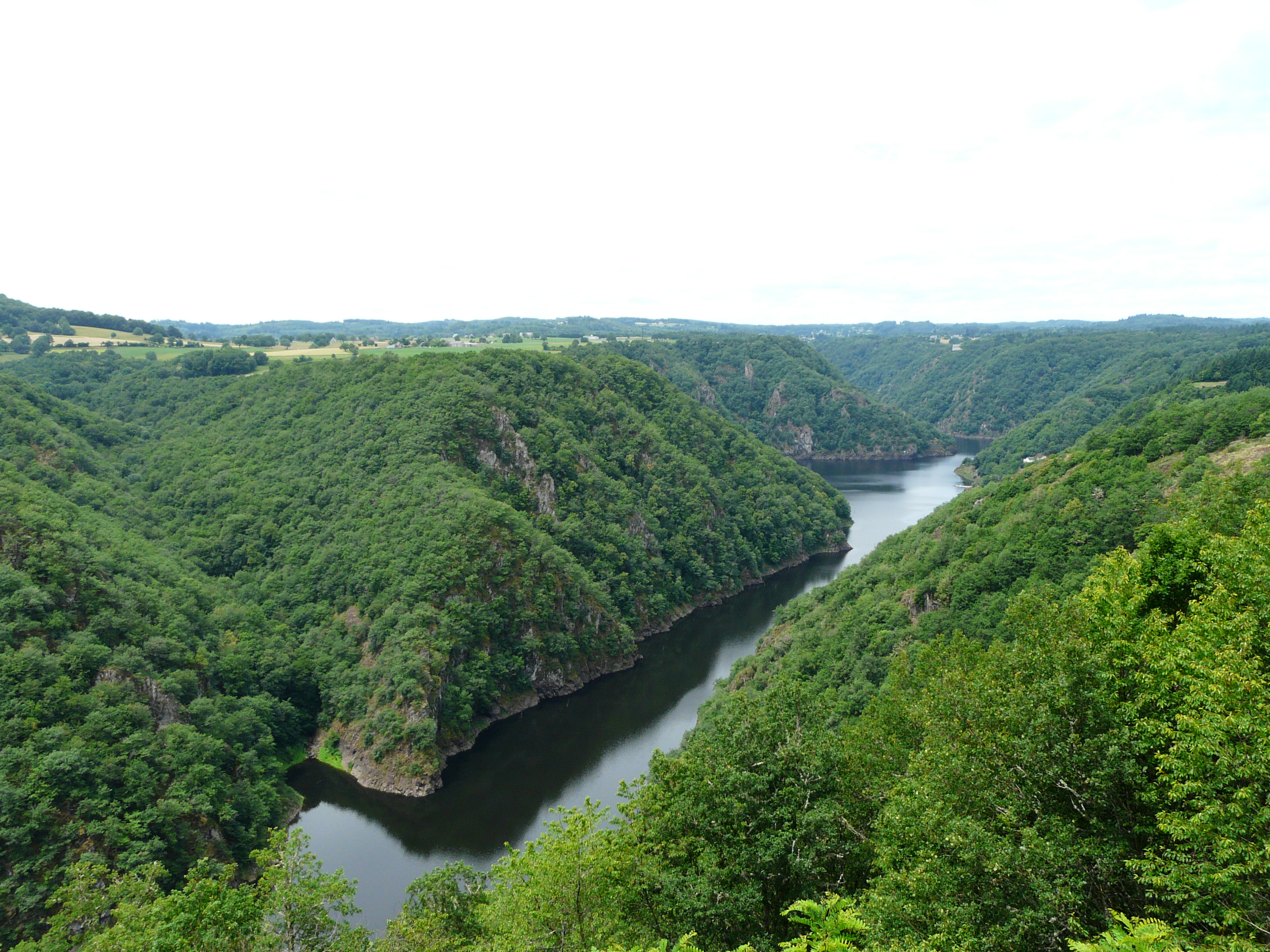 La Dordogne dans la retenue du barrage de Marèges, vue depuis le site de Saint-Nazaire, à Saint-Julien-près-Bort en Corrèze. En arrière-plan à droite, commune de Roche-le-Peyroux. Sur la gauche, commune de Saint-Pierre, dans le Cantal. Vue prise en direction de l'aval.